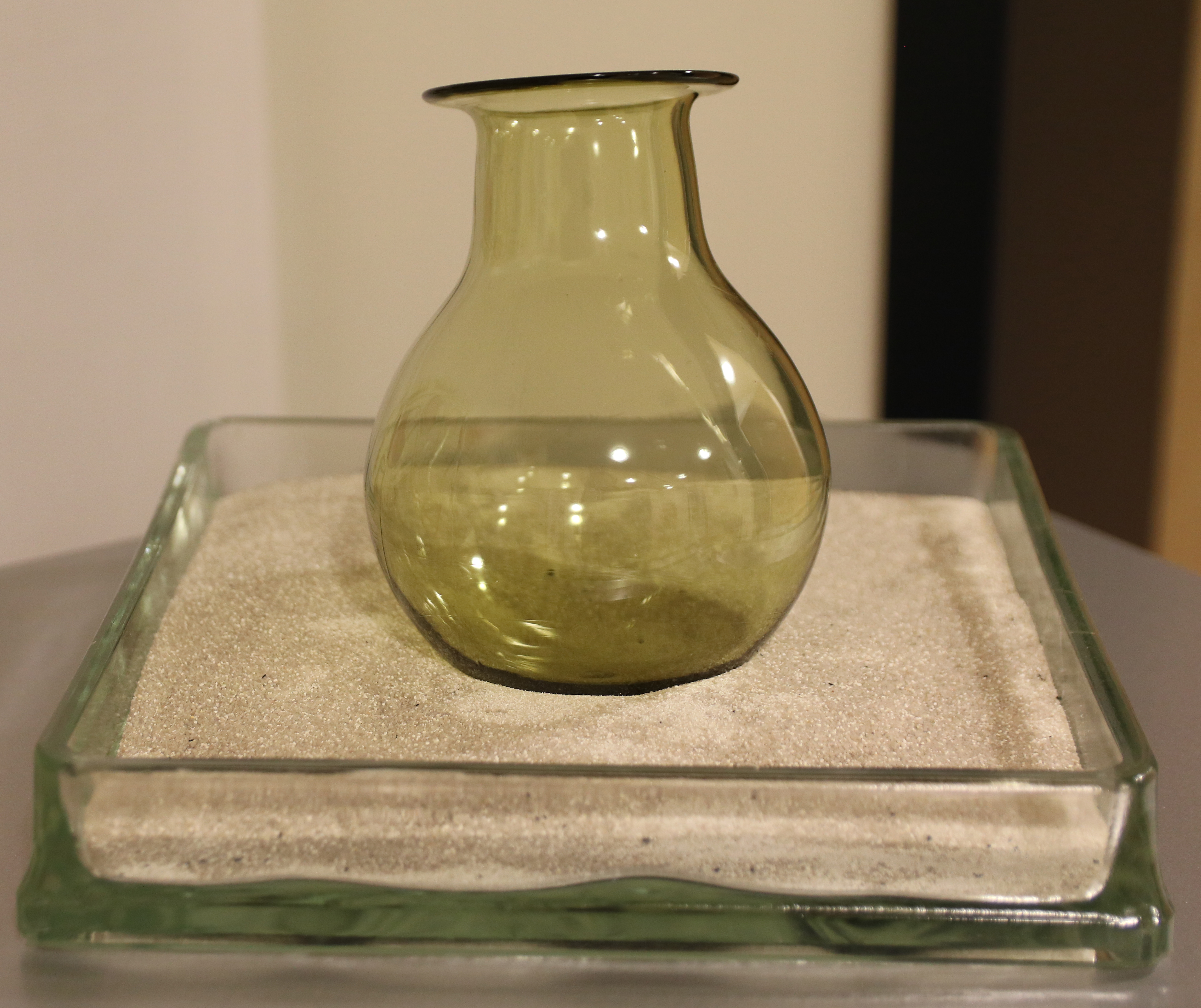 Harnschauglas (Matula) ca. 1550, Reproduktion durch die Glashütte Spiegelberg Wtbg., Dialysemuseum Fürth.